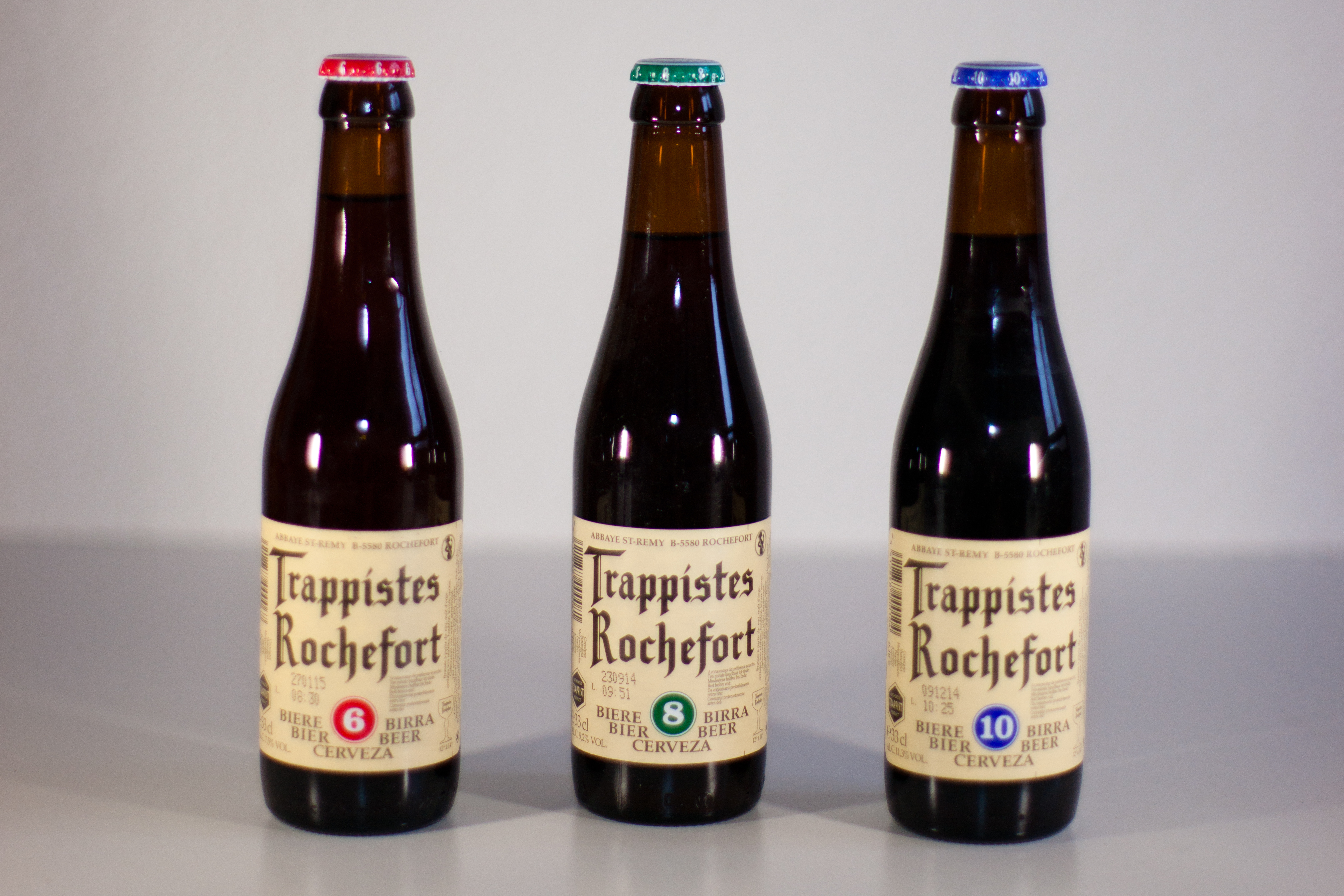 Trappistes de Rochefort, 3 bouteilles.